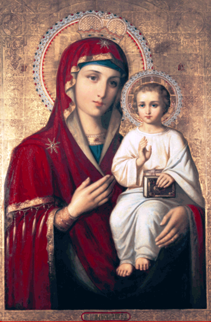 Копия XVIII века. Находится в Кутеинском монастыре.